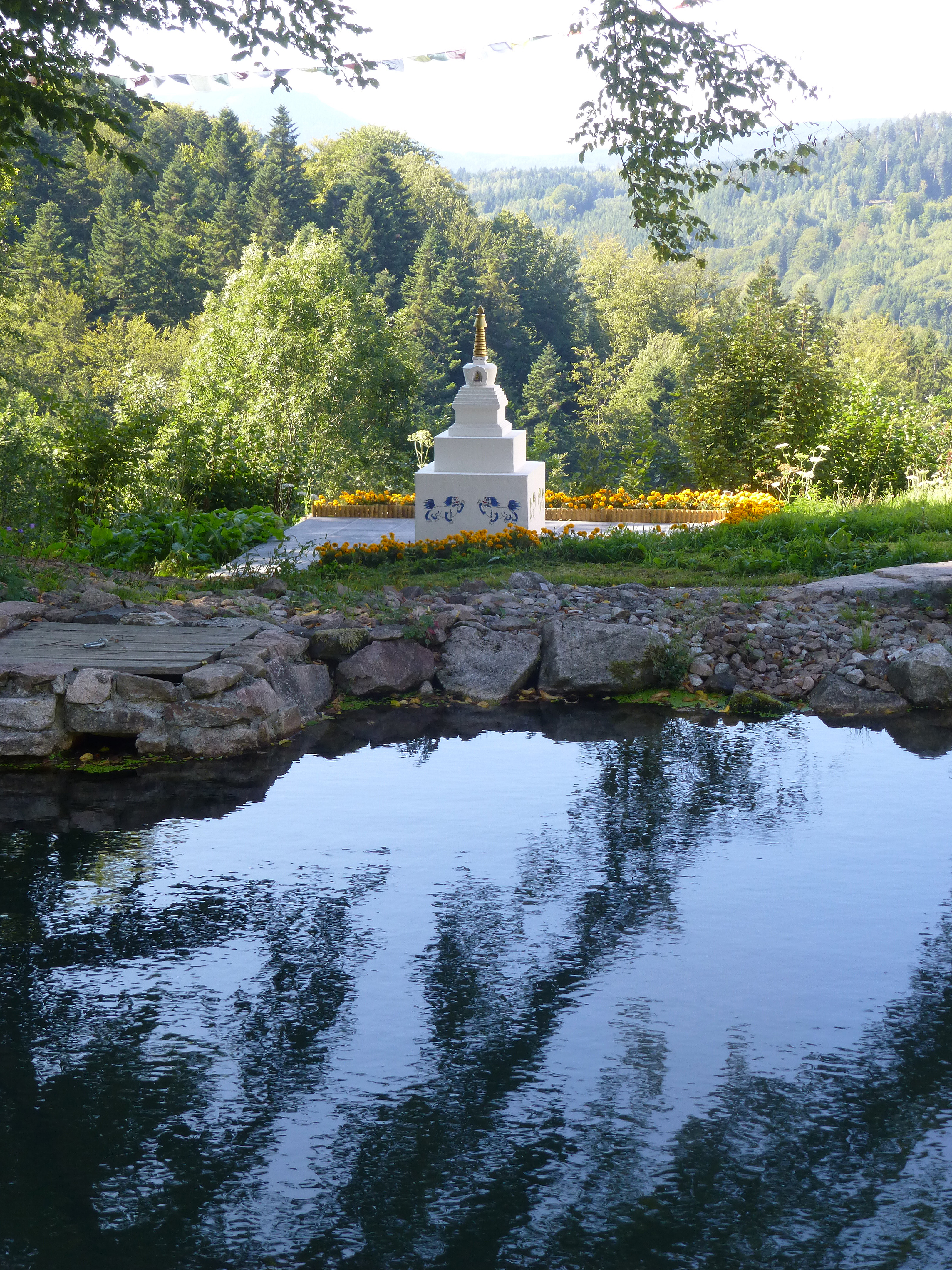 Stupa du centre bouddhiste tibétain (Bodhicharya-France) de Lusse, au lieu-dit La Bouille des Trois-Maisons (Vosges).